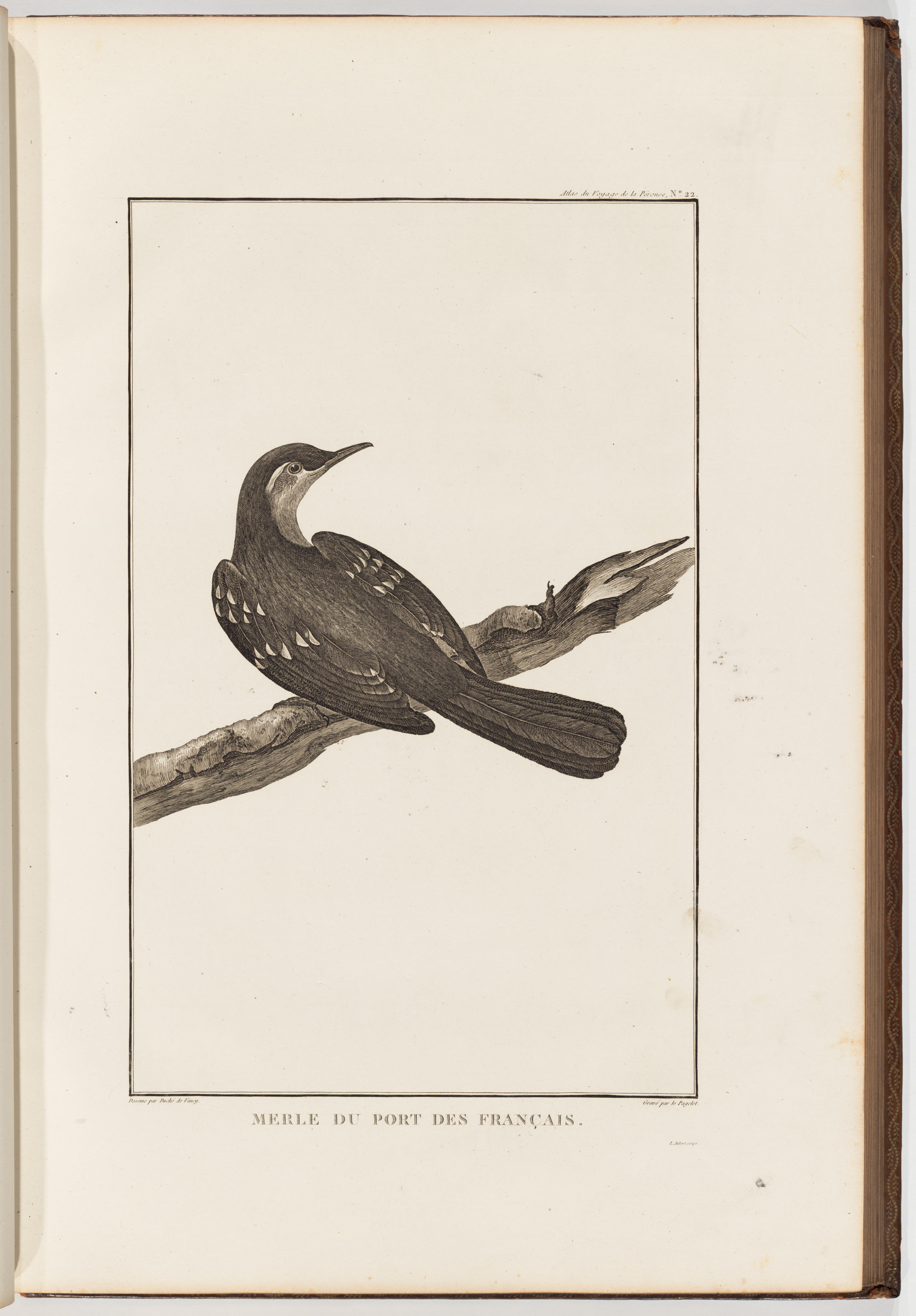 Voyage de La Pérouse autour du monde /publié conformément au décret du 22 avril 1791, et rédigé par L.A. Milet-Mureau.